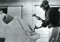 Rosalda Gilardi